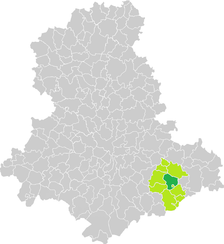 Carte de situation de la commune de Châteauneuf-la-Forêt (en vert foncé) dans le votre Canton (en vert clair) sur une carte des communes de la Haute-Vienne